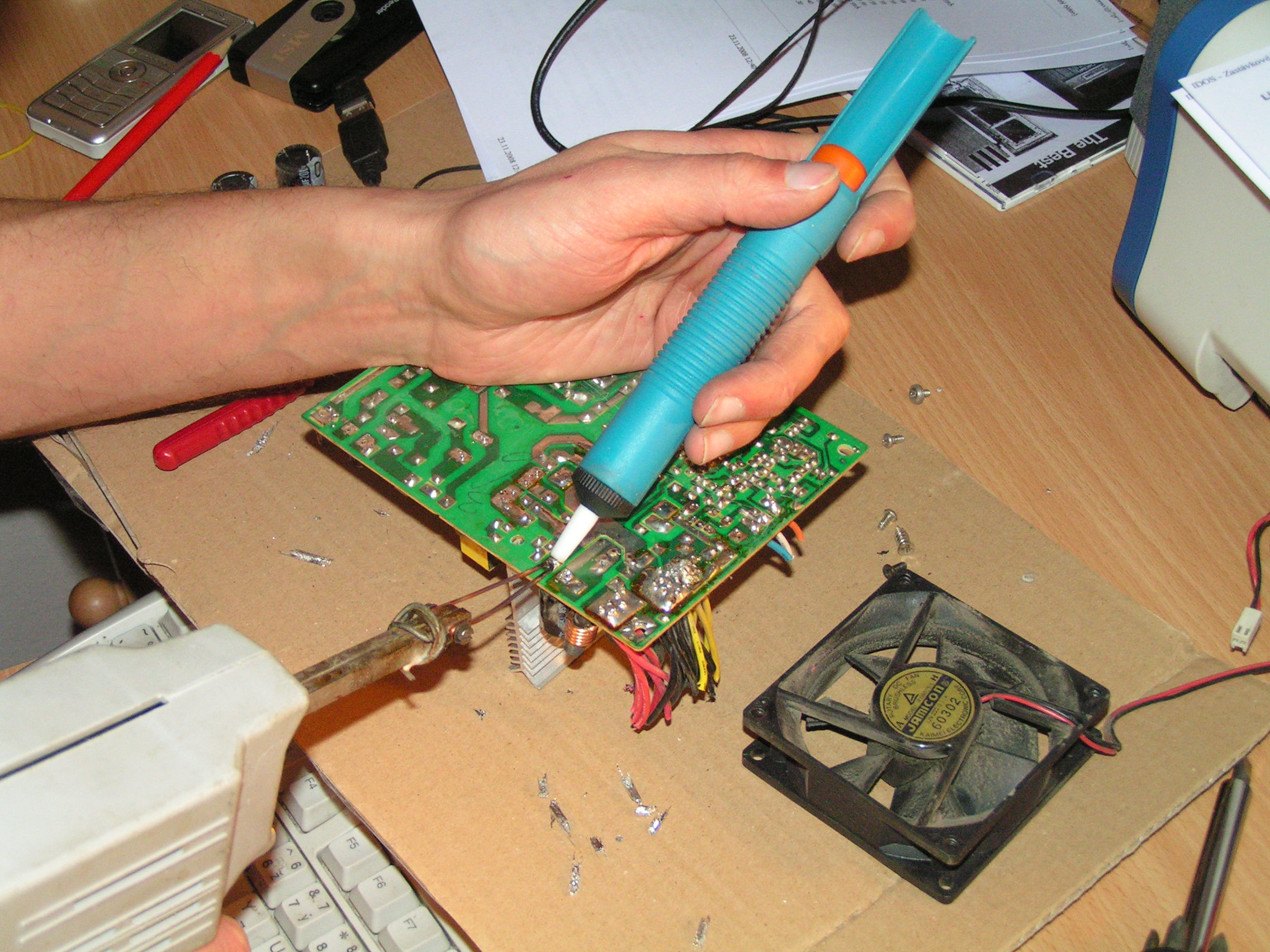 Solder sucker - removing of solder from PCB